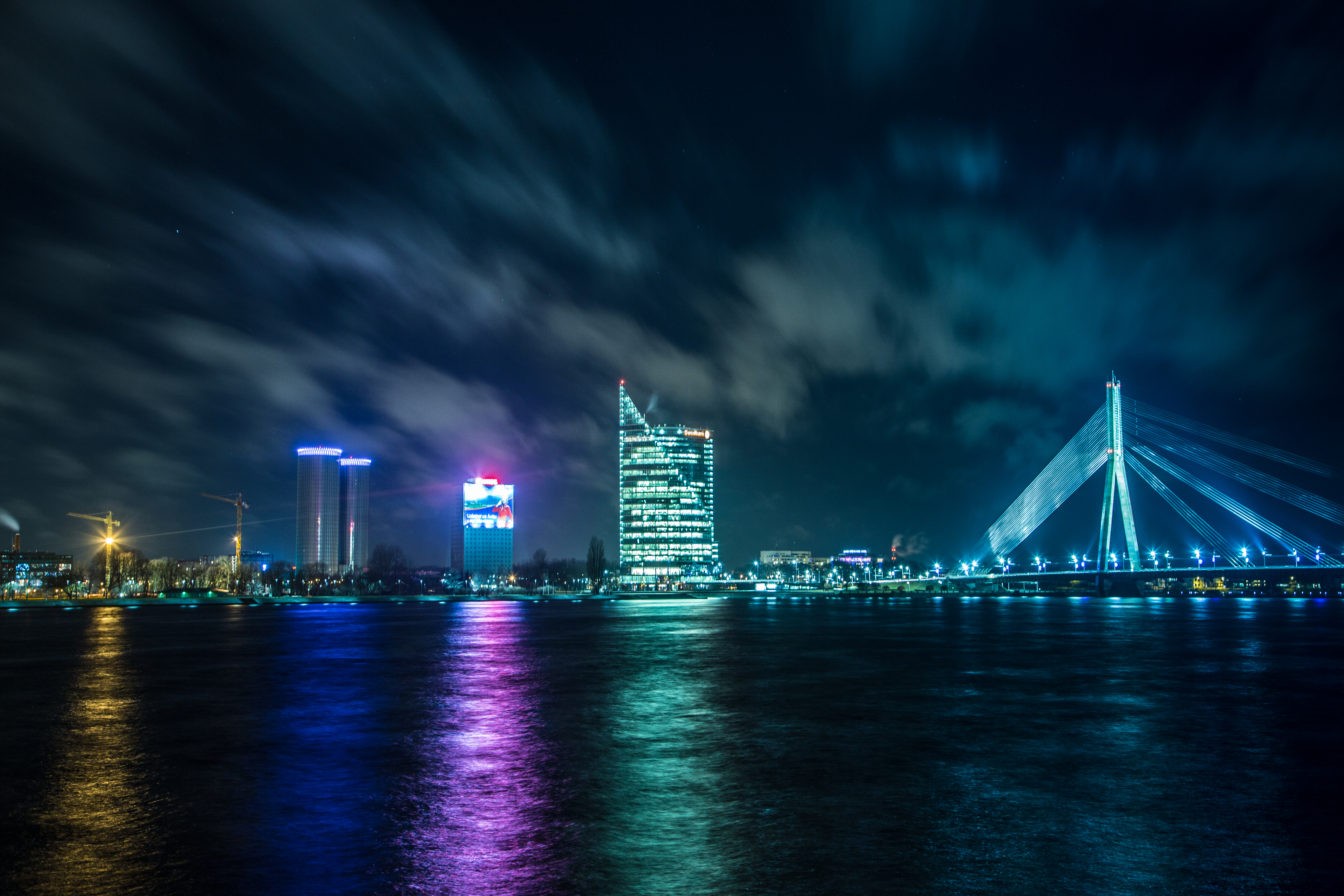 Вантовый мост в Риге ночью (латыш. Vanšu tilts, ранее Горьковский мост)